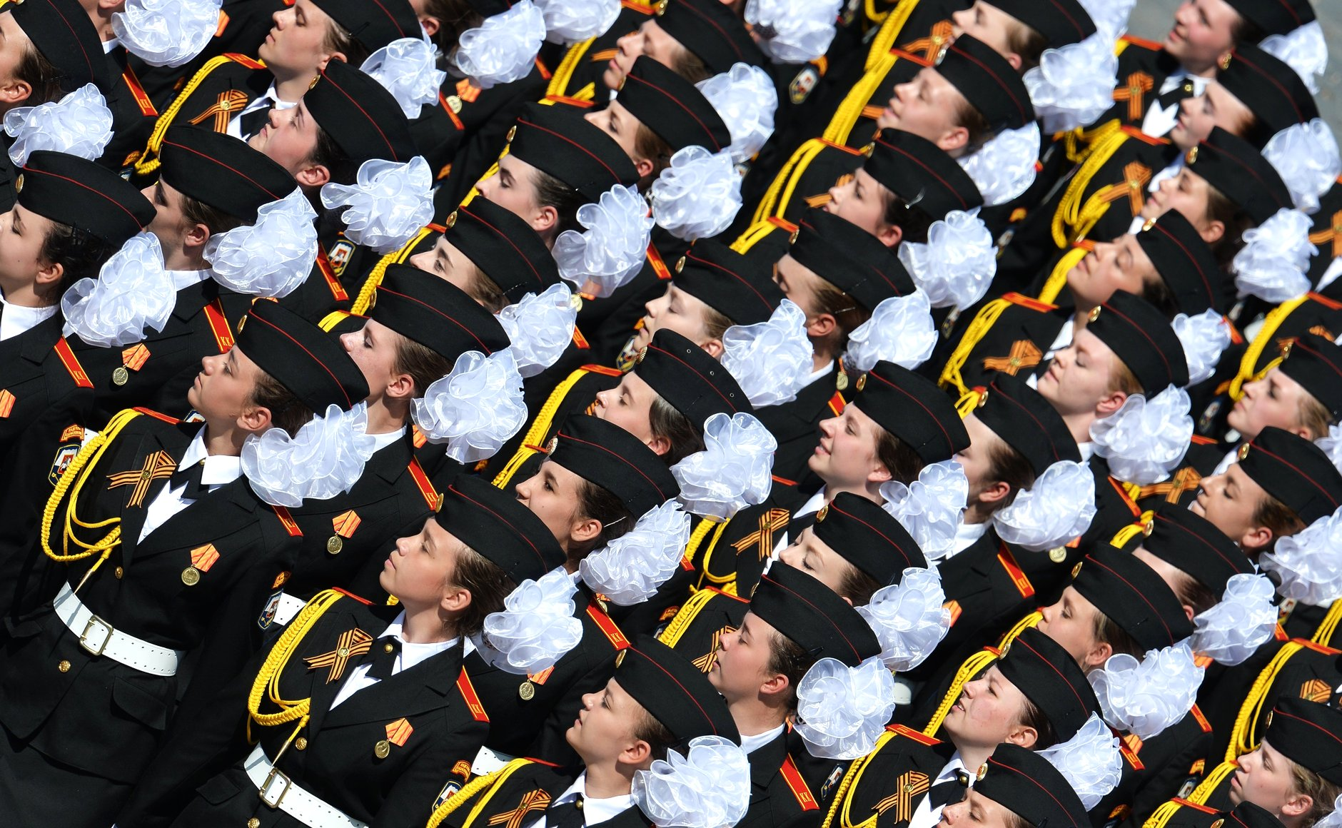 Воспитанницы кадетской школы во время военного парада в ознаменование 70-летия Победы в Великой Отечественной войне 1941–1945 годов.